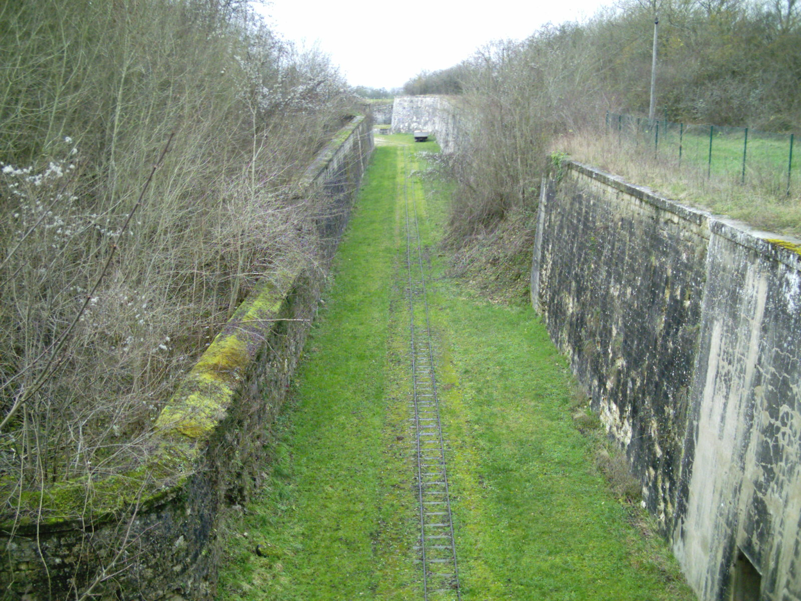 Enceinte du fort de Villey-le-Sec